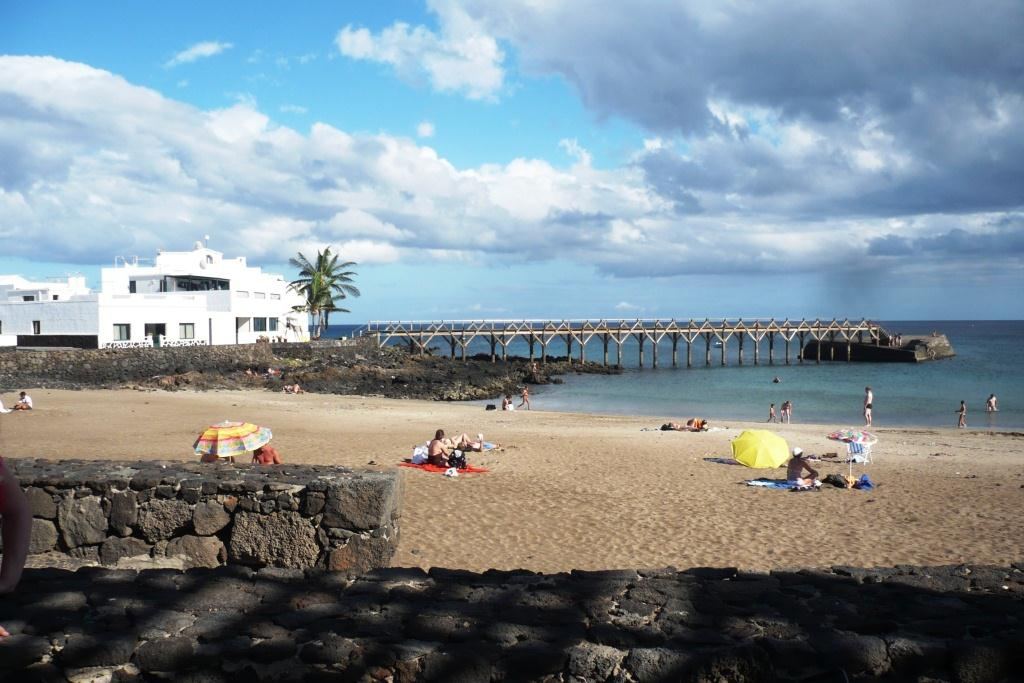 Arrieta, Lanzarote - Playa de La Garita